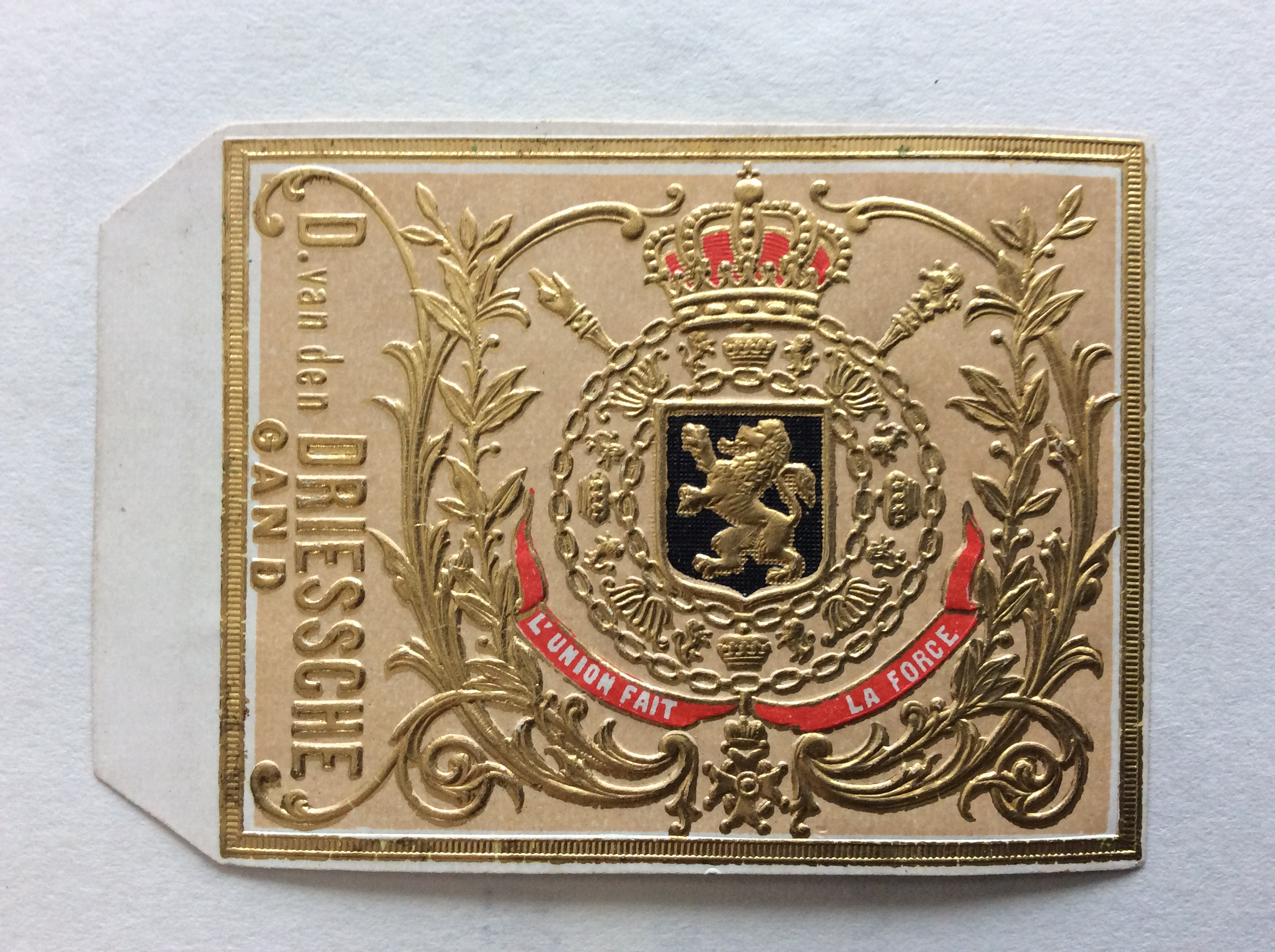 Unieke sigarenband bewerkt met bladgoud, ter gelegenheid van de troonsbestijging 1865